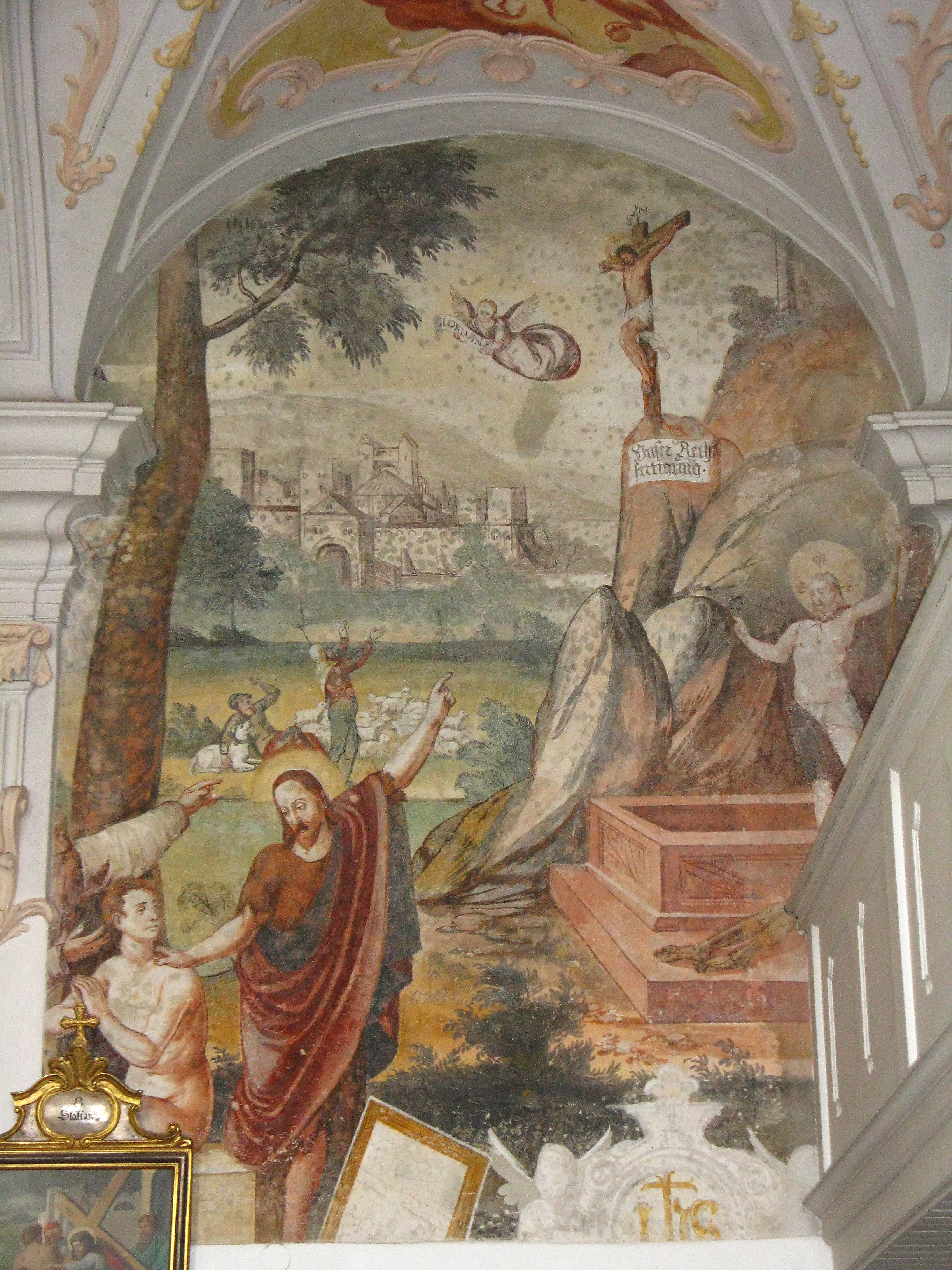 Wandgemälde über dem südlichen Eingang in der Kirche St. Katharina (Garching) im Langhaus. Um 1600. Der Mensch (Adam, li unten) wird von Johannes dem Täufer auf Christus verwiesen. Eingebunden auch die Verkündigung der Engel an die Hirten und Auferstehung.